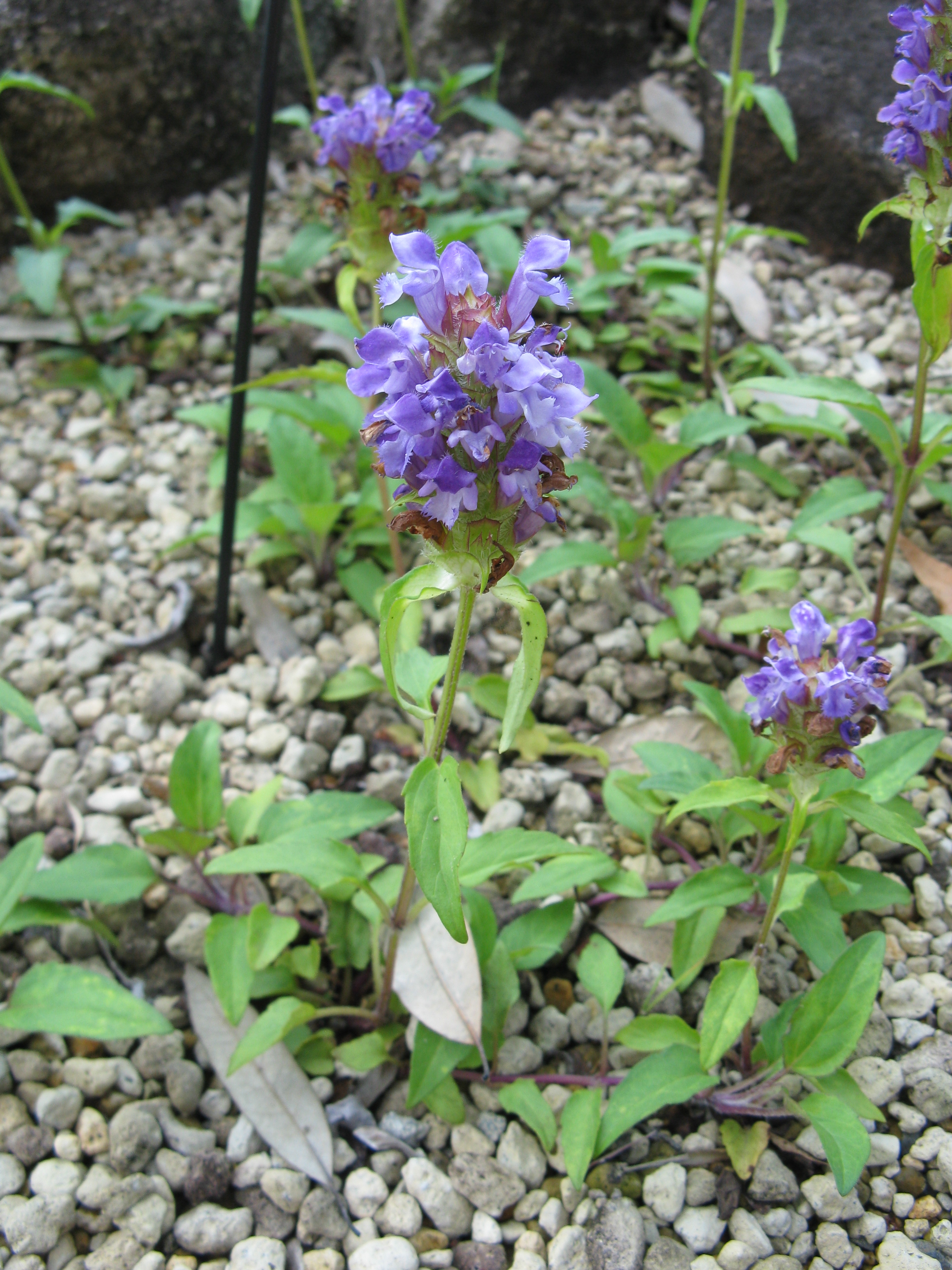 Prunella vulgaris subsp. asiatica